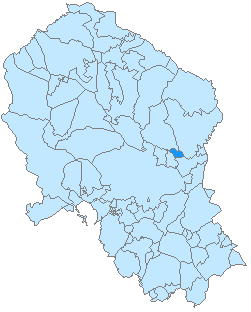 Mapa de Pedro Abad en la provincia de Córdoba, Andalucía, España.